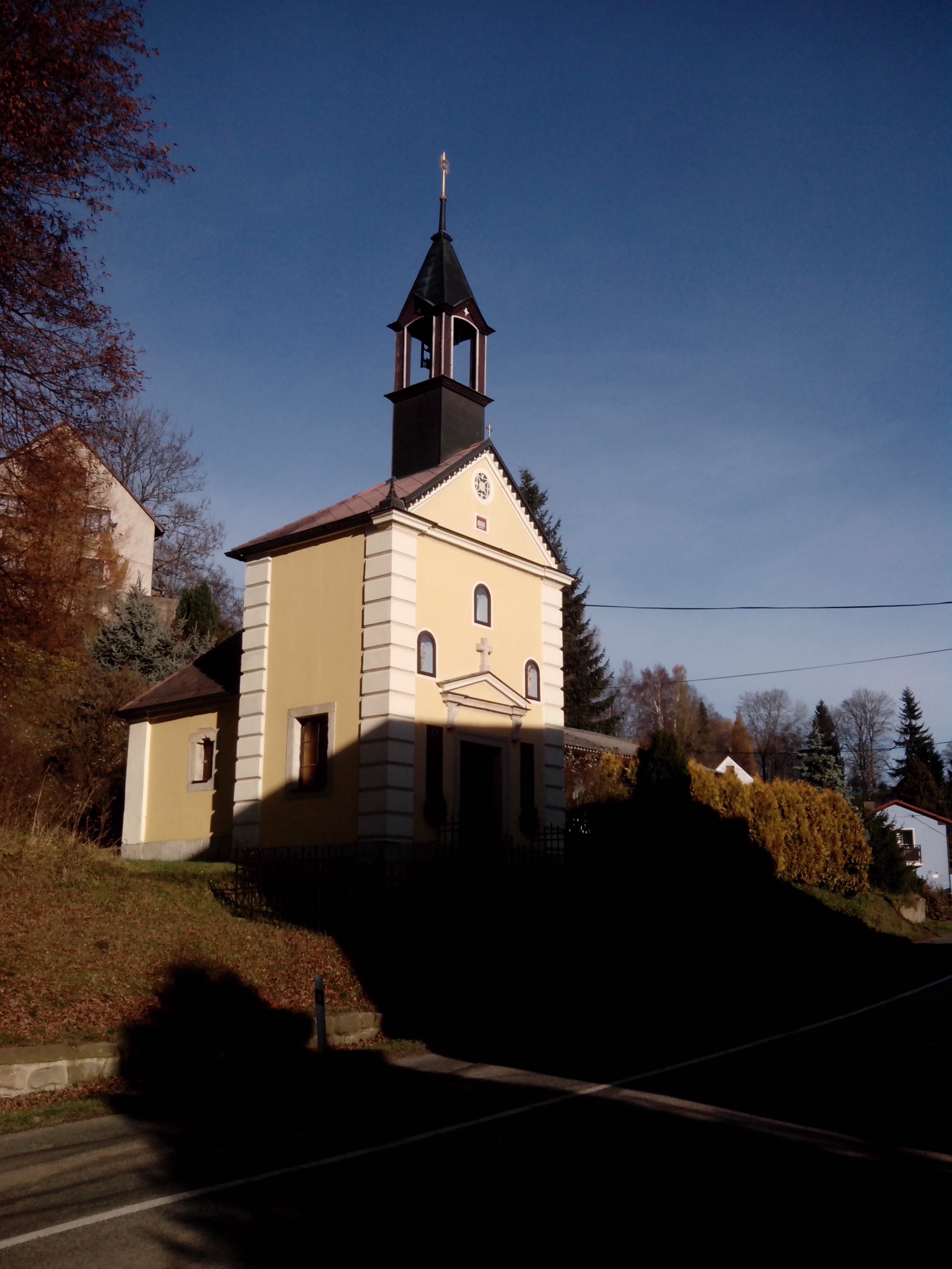 Kaple Panny Marie Pomocné v Pěkově 01